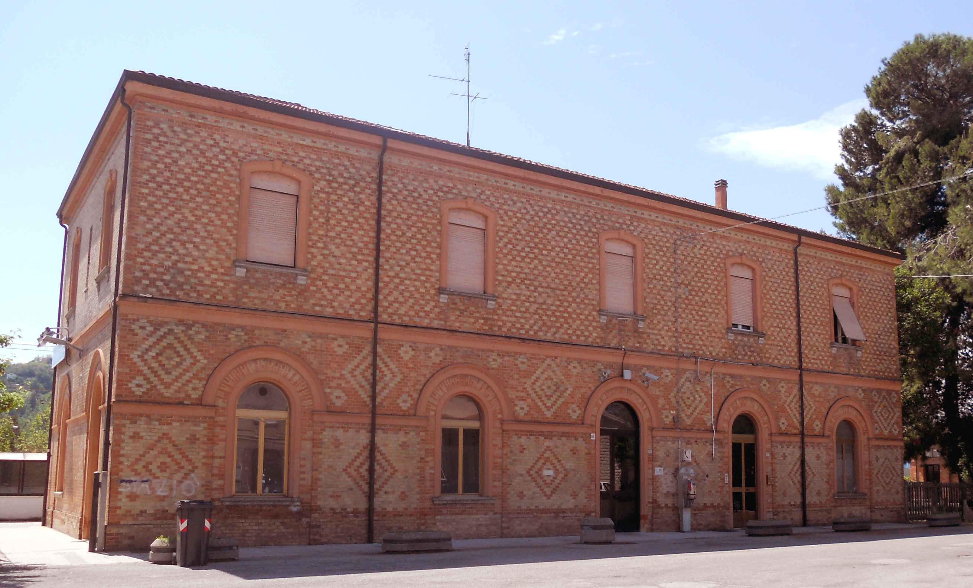 Stazione di Montecarotto e Castelbellino, ingresso biglietteria